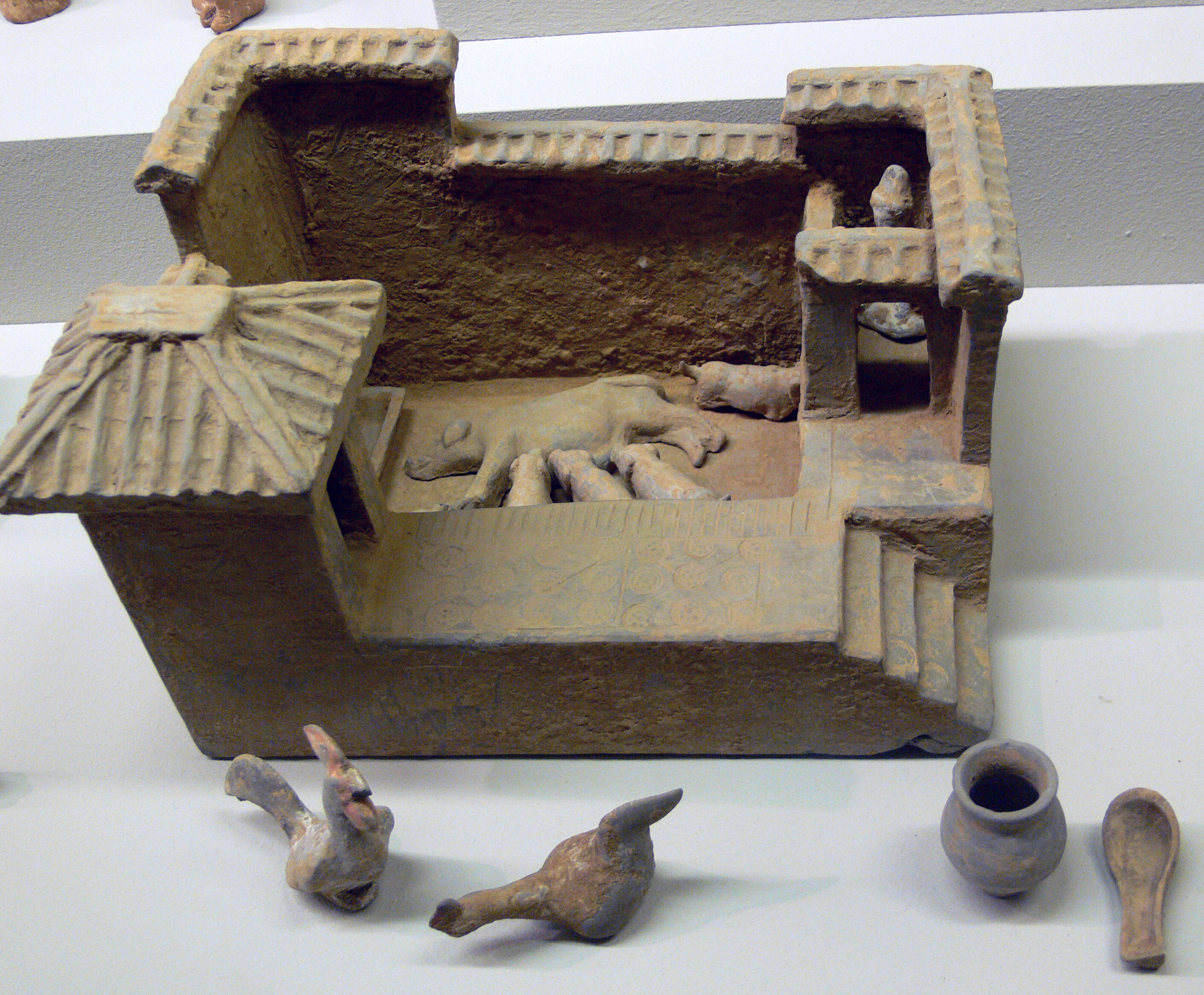 Modell eines Schweinestalls (mit Toilette mit einer Person; außerdem weitere zugehörige Tiere), graue Tonware mit Resten der Farbfassung; China, Ost-Han-Zeit (25–220) Linden-Museum, Stuttgart, Inv. Nr. OA 23.803a–o L